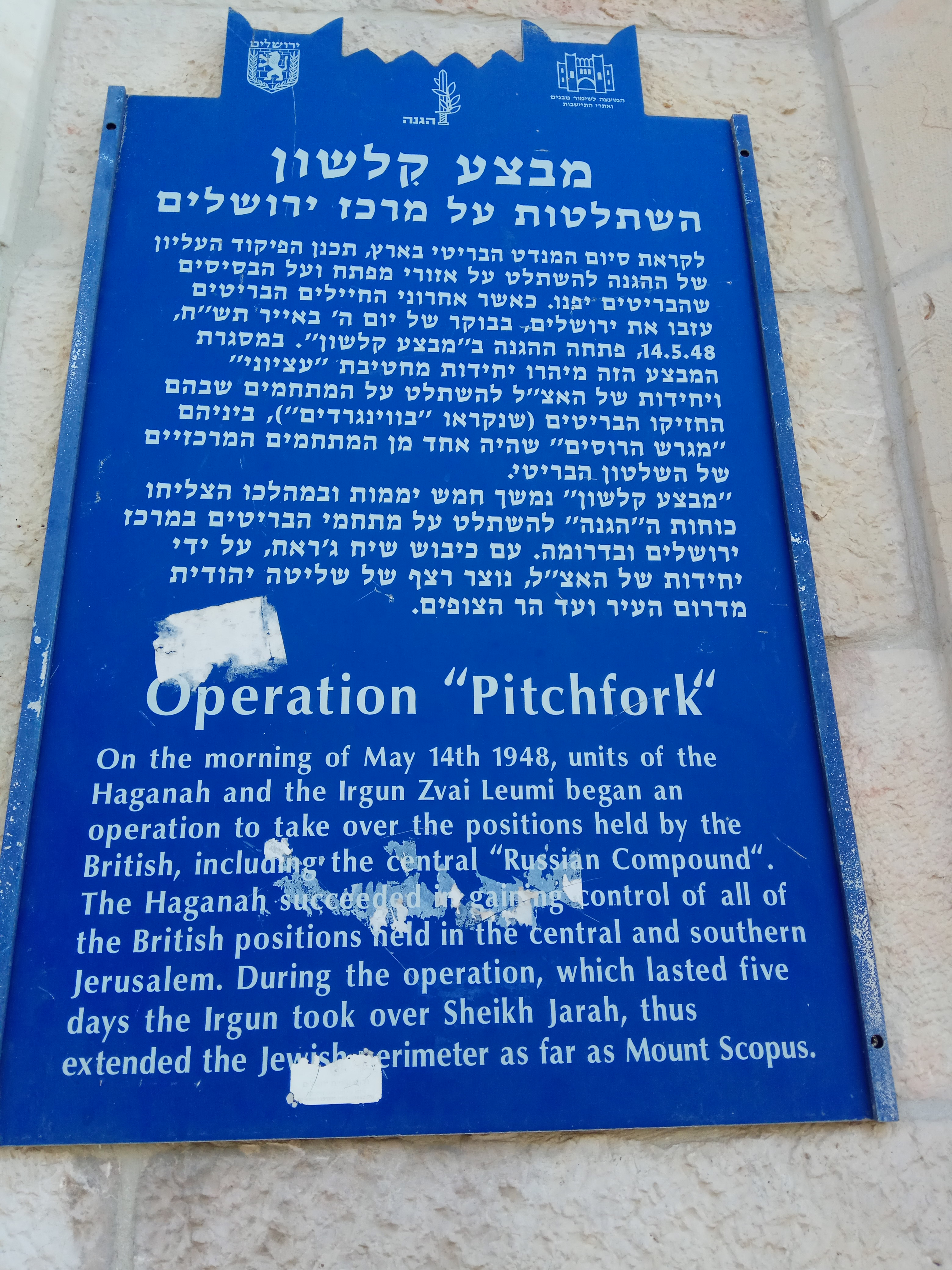 לוחית זיכרון למבצע קלשון בירושלים